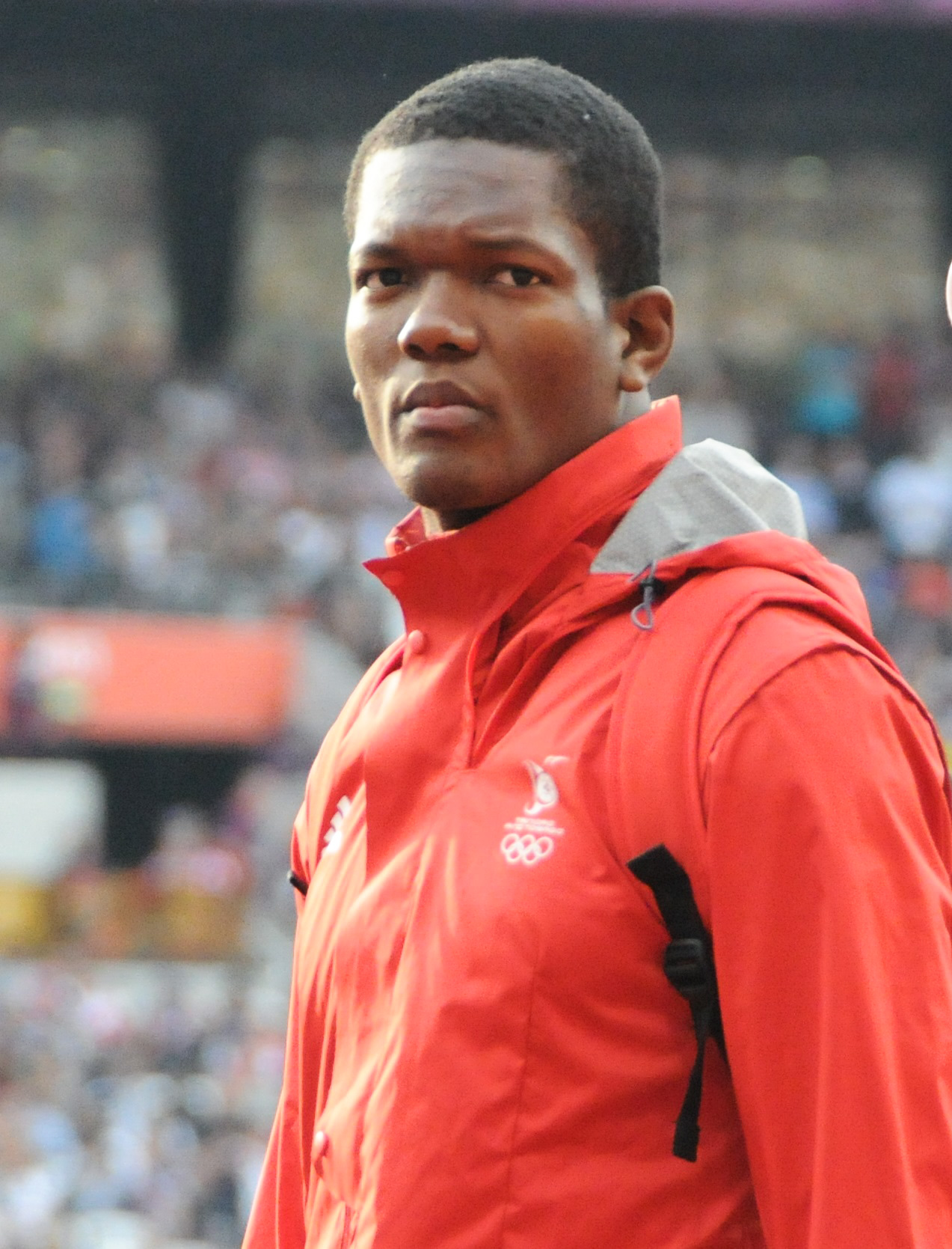 Portrait de Keshorn Walcott, premier champion olympique du javelot de Trinité-et-Tobago et le plus jeune de l'histoire de la discipline.